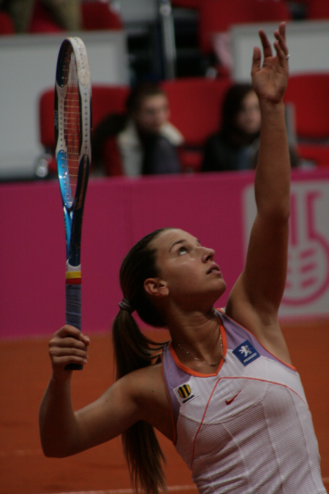 Dominika Cibulková, Fed Cup, Slovakia